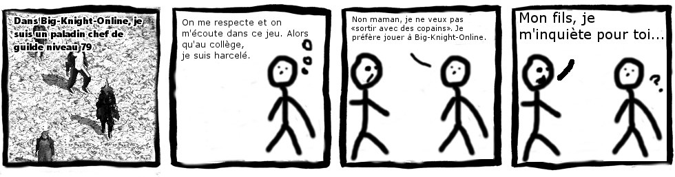 Strip en 4 cases expliquant la raison principale d'addiction au jeu des autistes Asperger